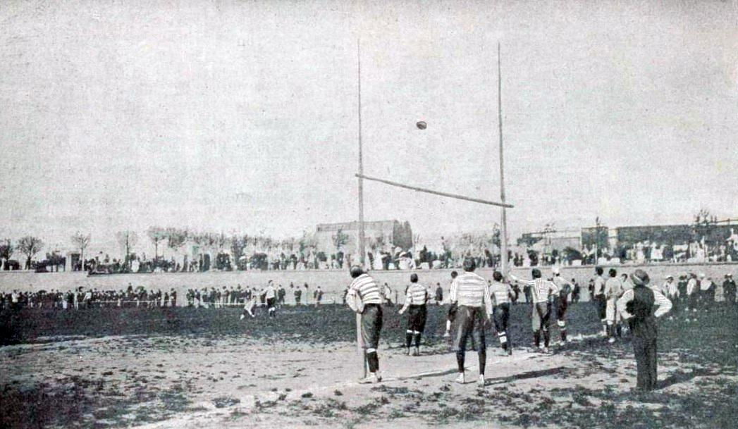 Finale du championnat de France de rugby 1900, Bordeaux échoue pour convertir son unique essai, face au RCF (bandes horizontales).